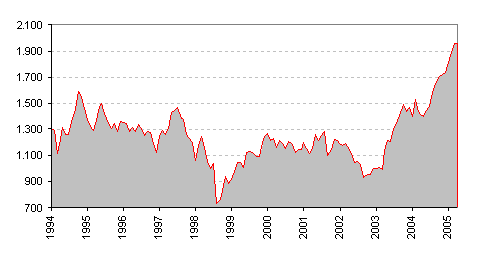 Índicador IPSA, 1994-2005 Esta imagen es de uso libre, no tiene ningún tipo de derecho de autor ya que fue creada por mi.